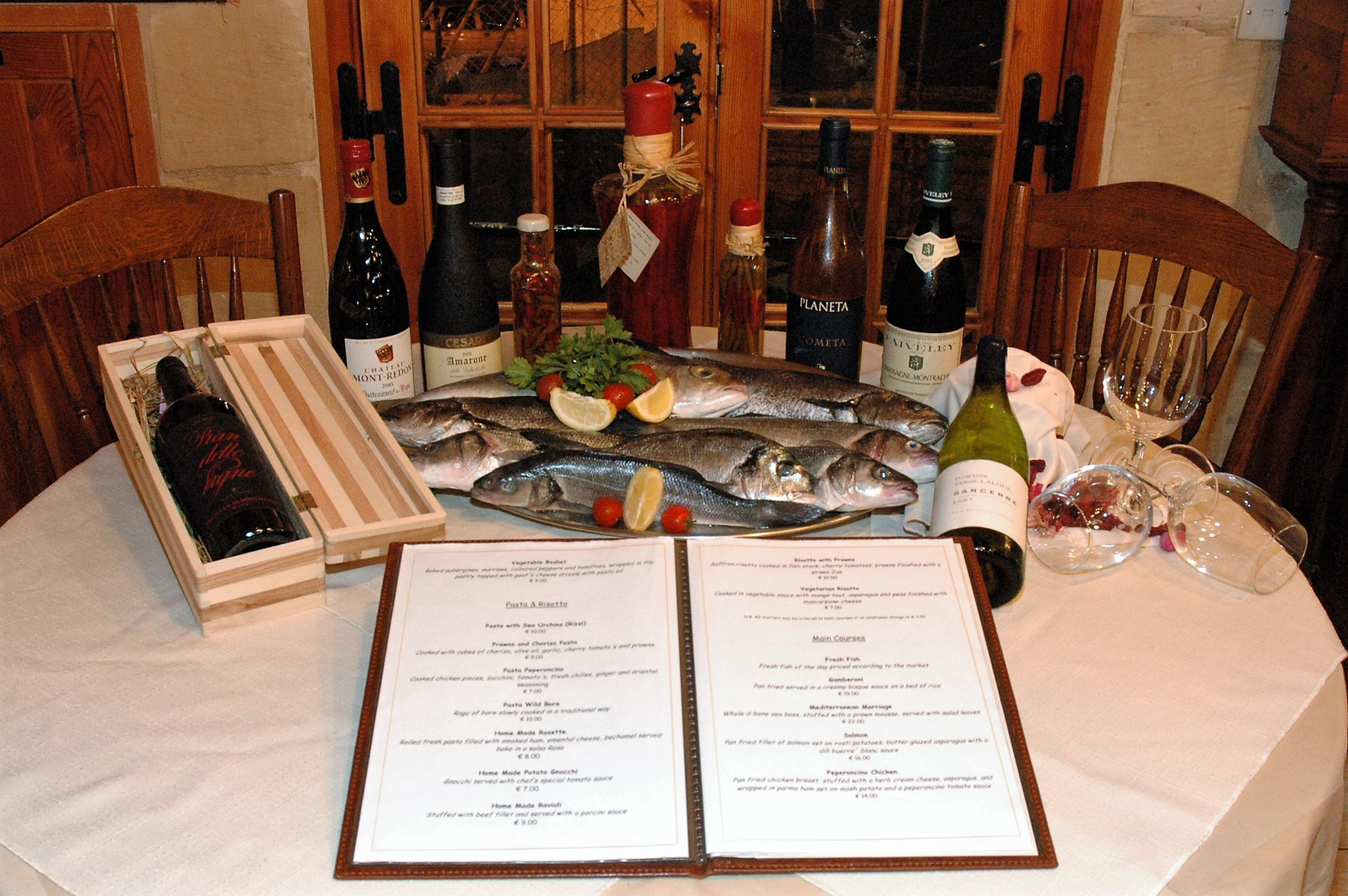 Präsentation von frischem Fisch (Lampuki, dt. ‚Goldmakrelen‘) sowie von einheimischem Wein und eingelegten Peperoncini; davor die aufgeschlagene Speisekarte. Im Restaurant Peperoncino in San Ġiljan (engl. ‚St. Julian's‘) auf Malta.